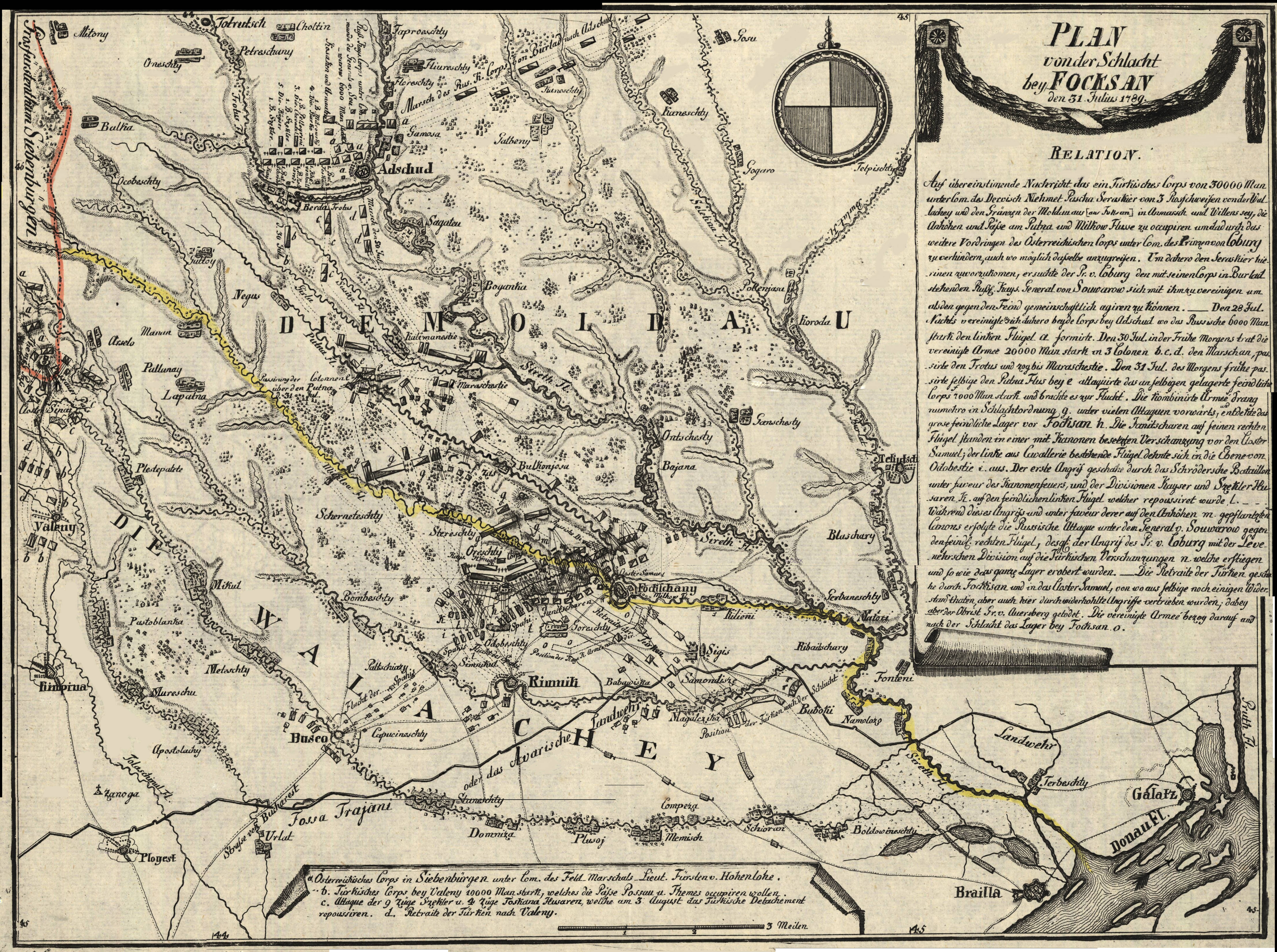 Plan von der Schlacht bey Focksan den 31 1ulius 1789 " este o hartă colorată de 36,5 x 27 cm, cuprinzând regiunea Brăila - Buzău - Focşani - Trotuş, indicând poziţiile ocupate de beligeranţi in timpul războiului Russo-Turk 1789